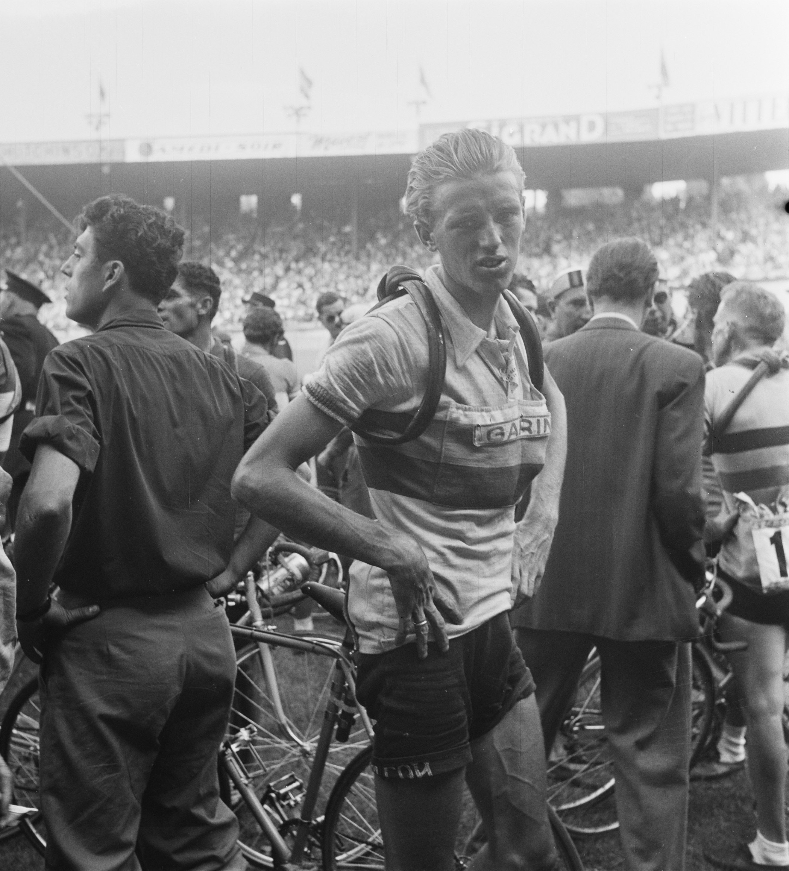 Finish Parijs. Jan Nolten.